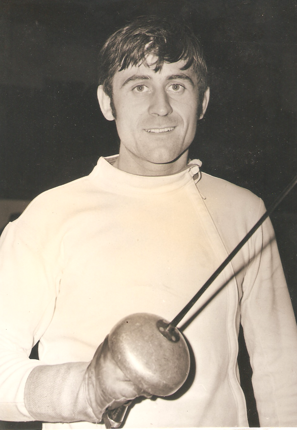 Jacques Brodin